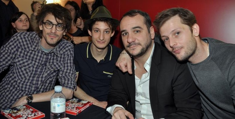 Hugo Gélin, Pierre Niney, François-Xavier Demaison et Nicolas Duvauchelle à la présentation du DVD de "Comme des frères" à la Fnac Bercy Village